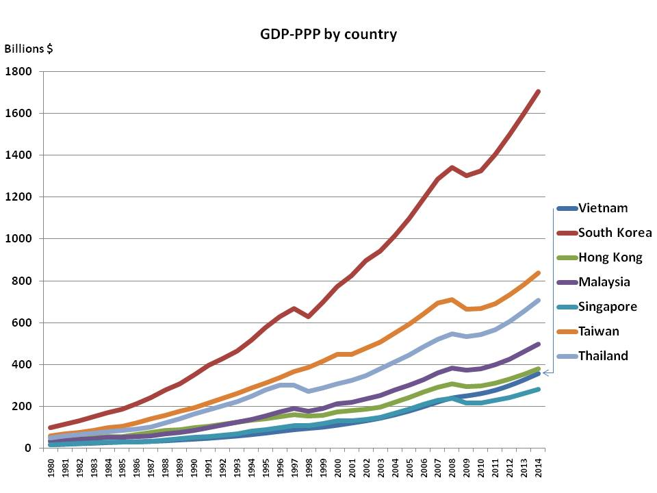 So sánh GDP-PPP (tính theo đô la quốc tế) giữa Việt Nam và các nước công nghiệp mới qua các năm 1980-2014. Số liệu lấy từ Quỹ Tiền tệ Thế giới (IMF).